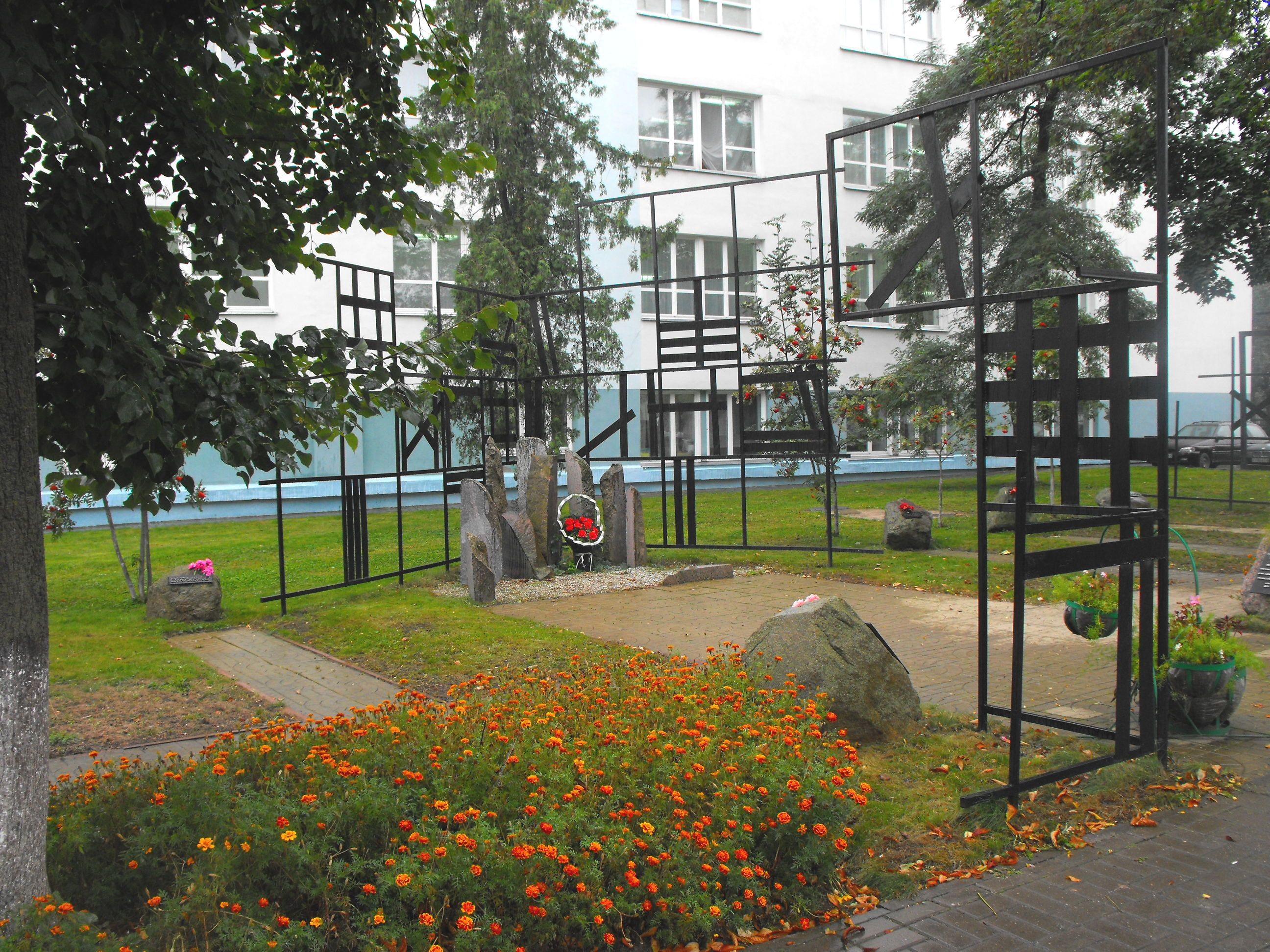 Мемориальный комплекс в центре Слуцка на улице Копыльской в память убитых евреев - узников Слуцкого гетто. Возведён в 2007 году. Автор проекта - Леонид Менделевич Левин.